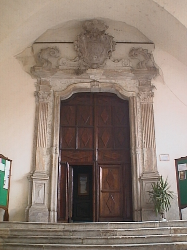 Portale della chiesa di San Michele a Cagliari